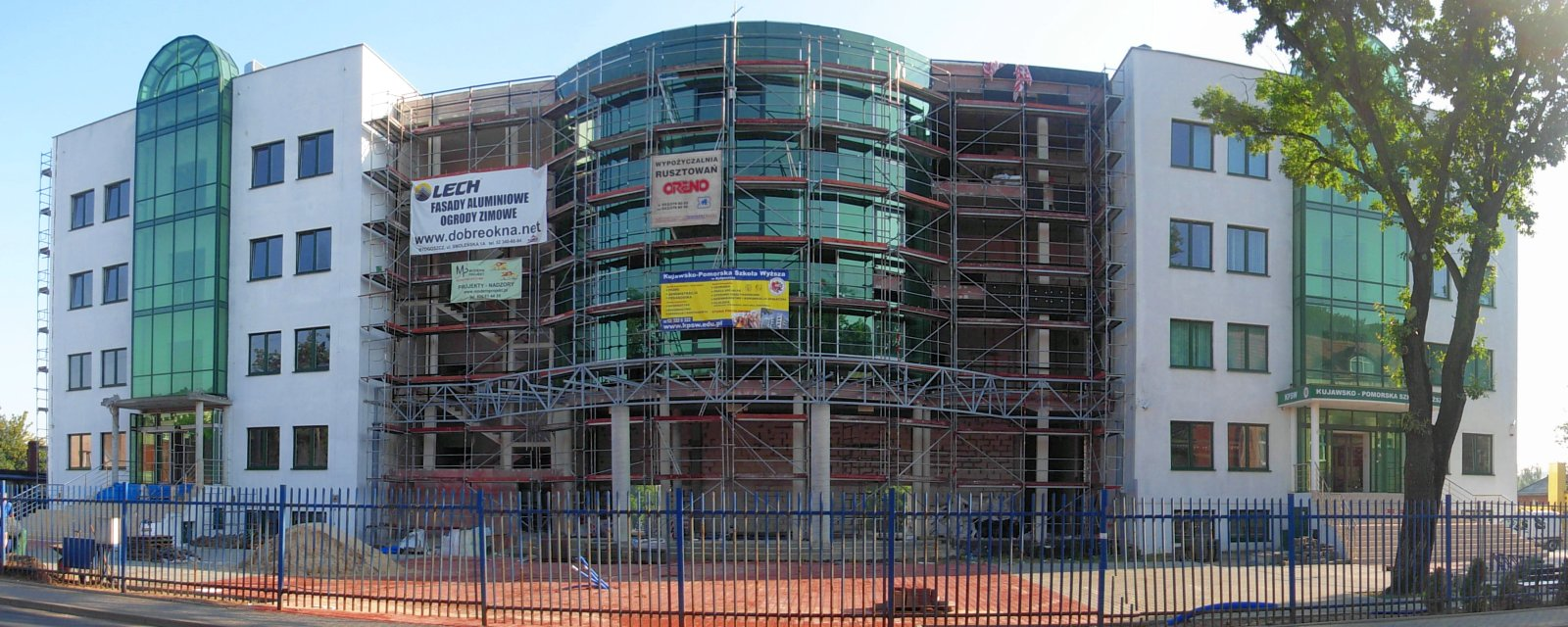 Kujawsko-Pomorska Szkoła Wyższa w Bydgoszczy. Campus przy ul. Toruńskiej w budowie.